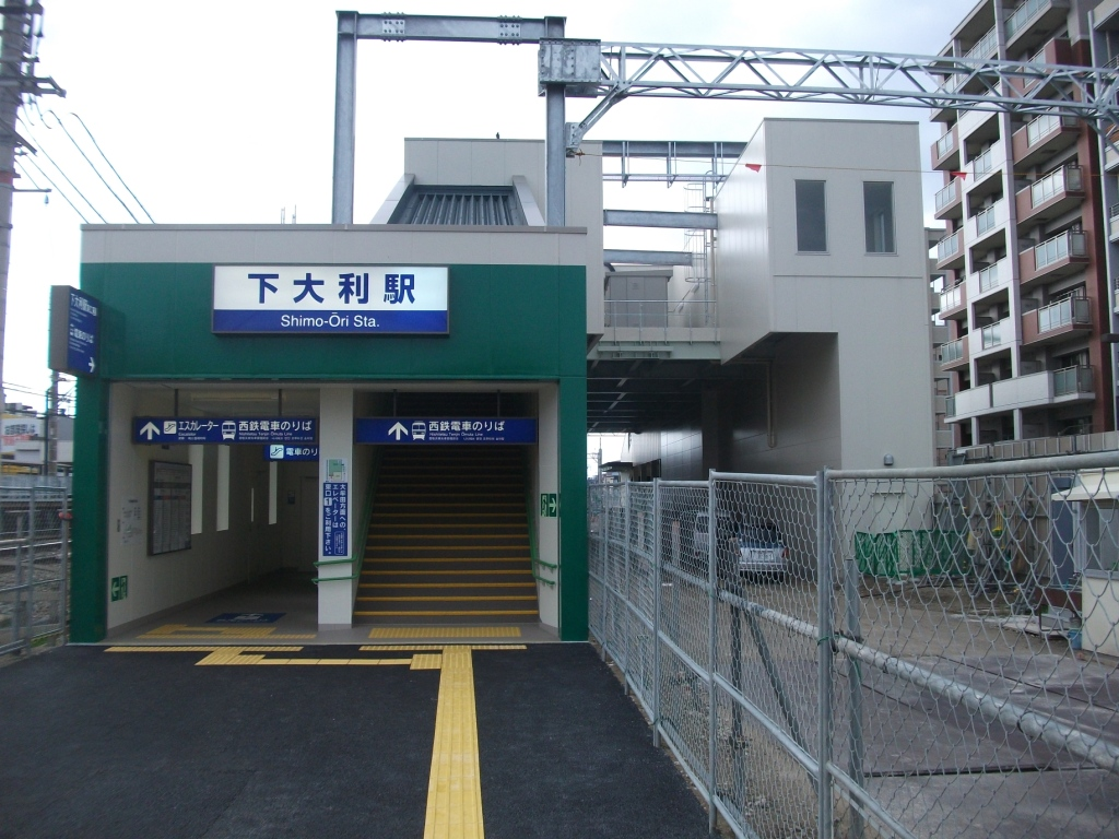 西鉄天神大牟田線下大利駅東口仮設駅舎